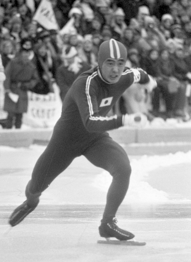 Wereldkampioenschappen schaatsen heren te Oslo; nr. 3a, 4 Hida (Japan) in actie